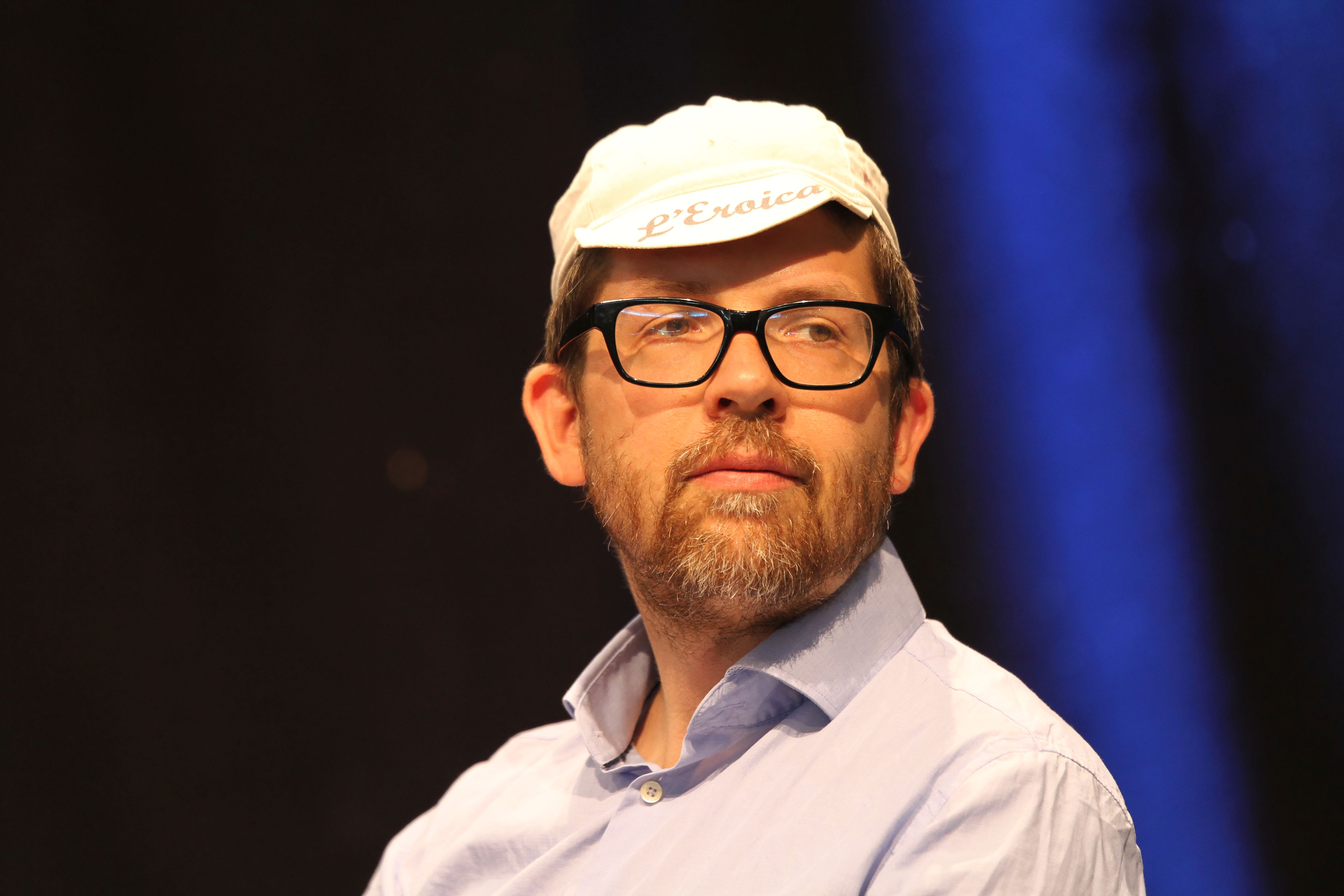 Bilder von der Comic Con Germany 2019 in Stuttgart